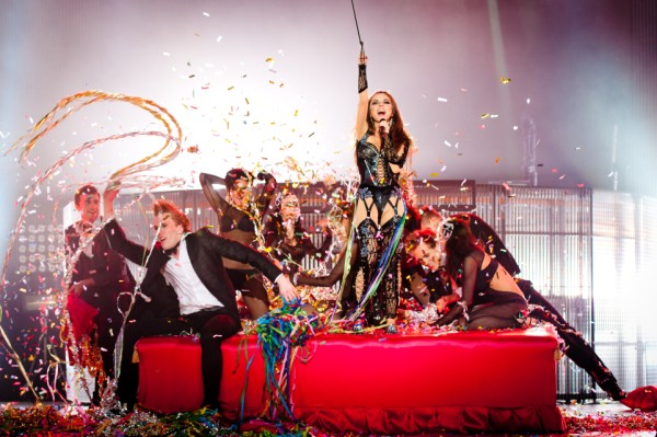 Анна Плетнёва на Концерте в Крокус Сити Холле исполняет песню Плохая Девочка